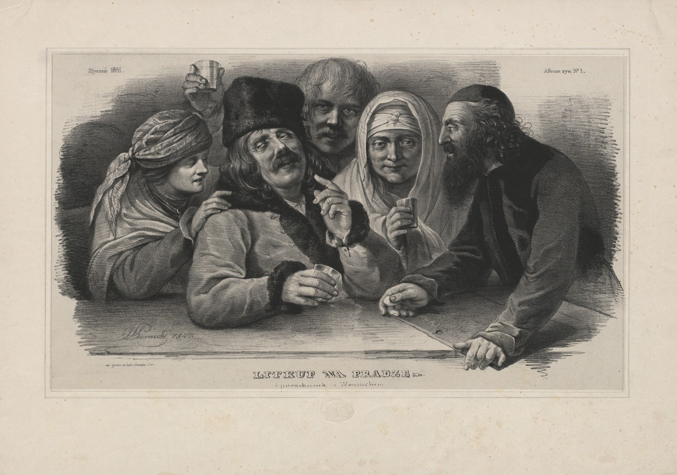 Litkup na PradzeAlbum cynkograficzno-rysunkowe warszawskie